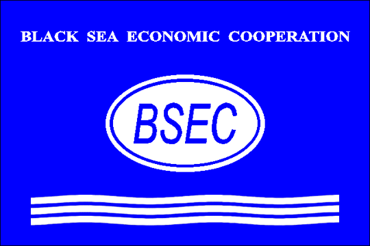 Bild: Offizielles Logo der BSEC